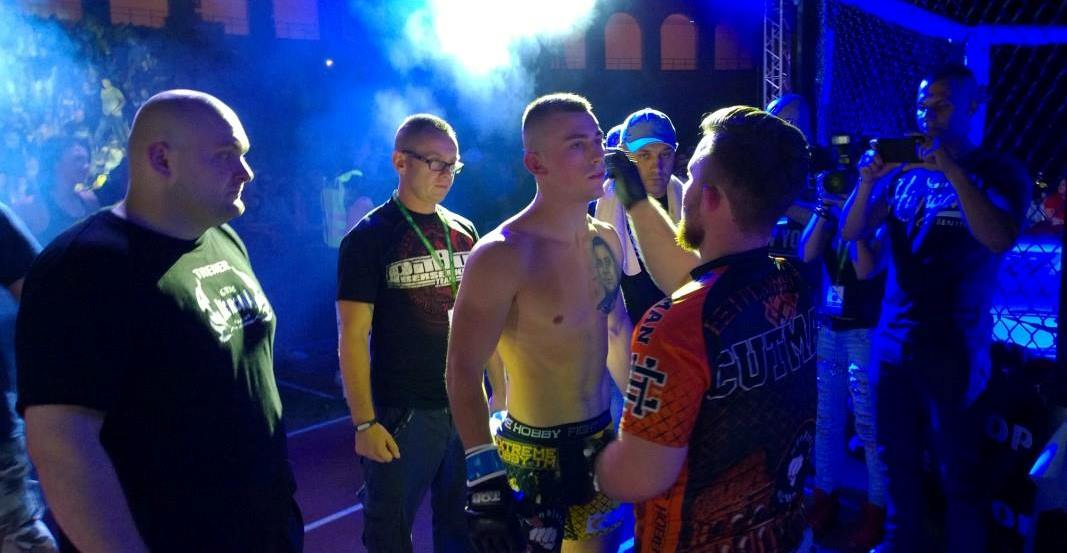 Cutman nakładający wazelinę na twarz zawodnika na gali MMA